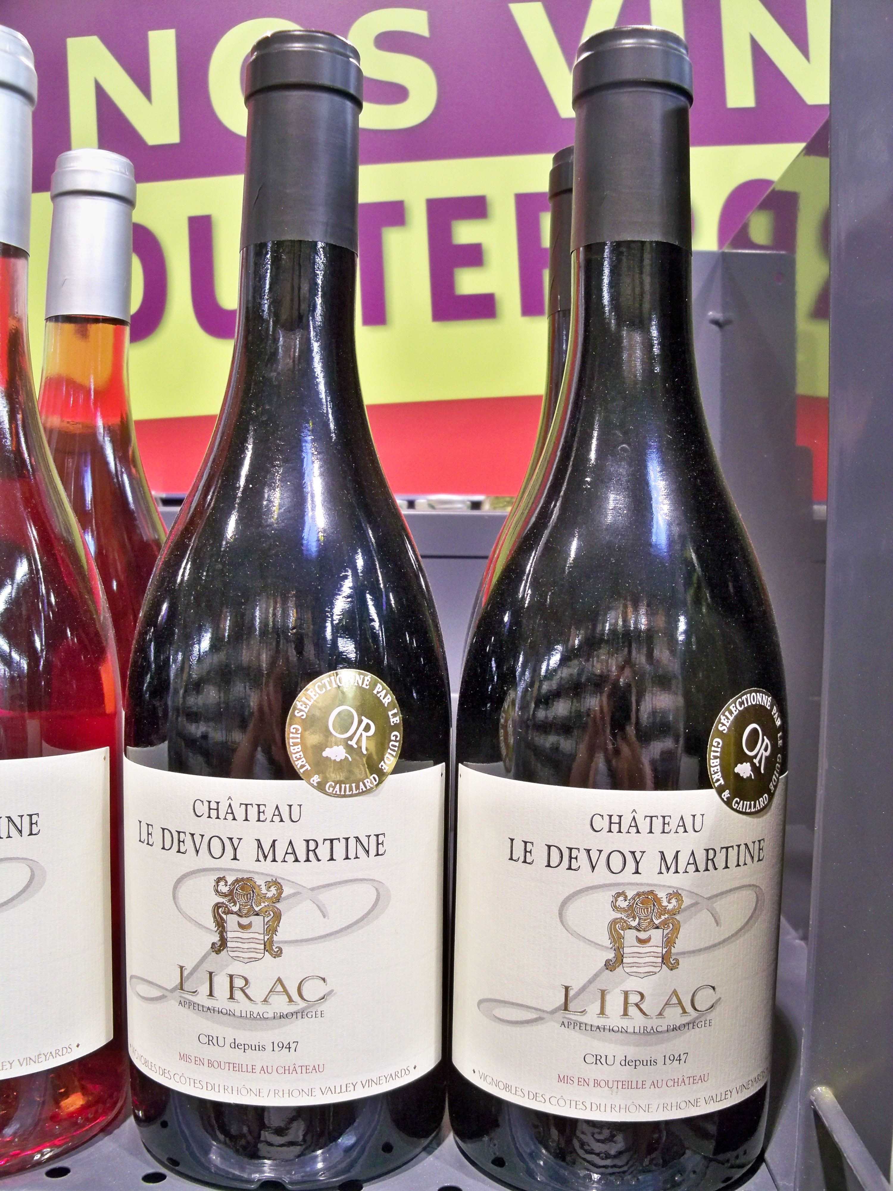 bouteille de Lirac (AOC)